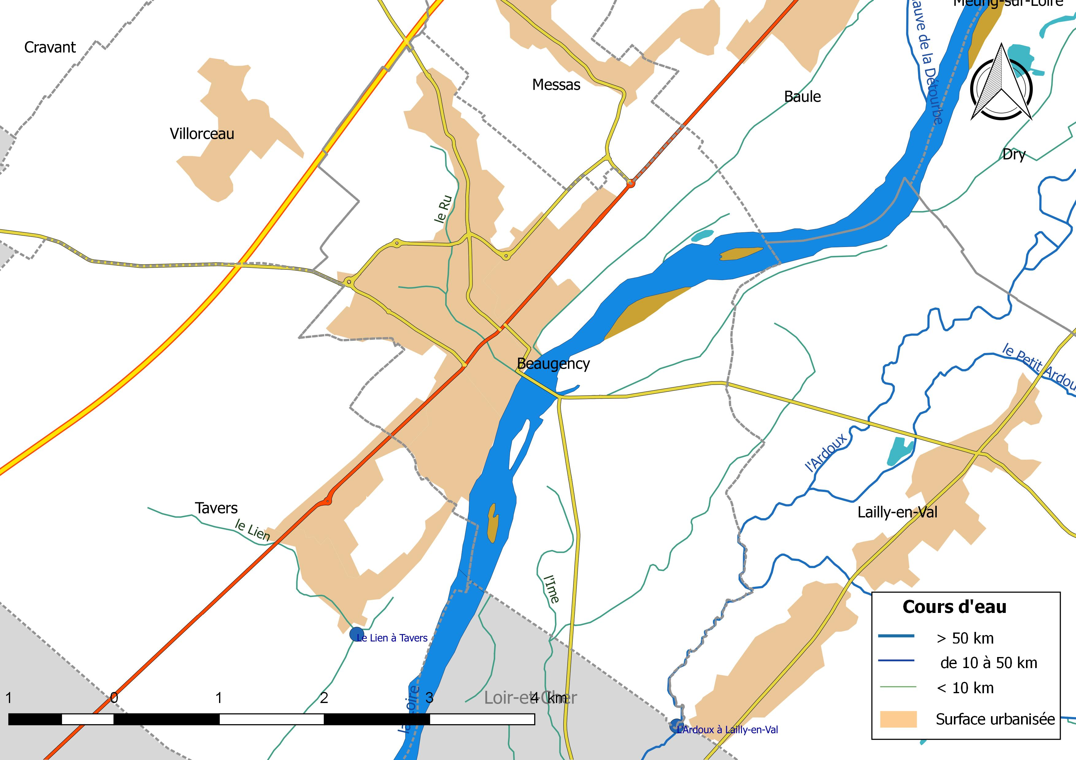 Carte du réseau hydrographique de la commune de Beaugency (France).